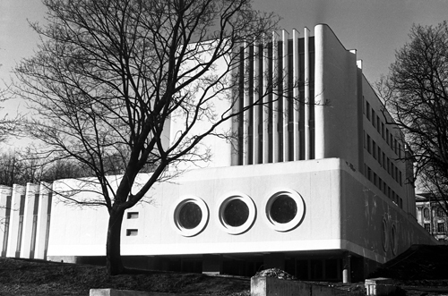 Реконструкция школы №4 в Минске реализована по проекту Карако Виктора